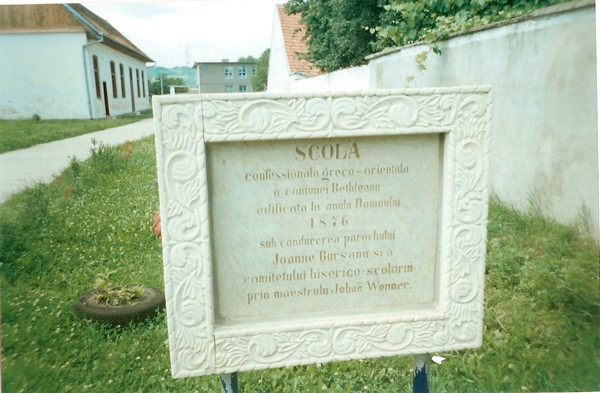 Școala veche din Beclean, județul Brașov (1876-cca.1980)